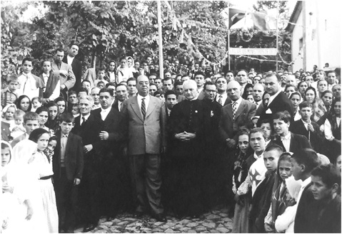 O Padre Abílio é acolhido pelo povo de S. Mamede no seu regresso à paróquia.